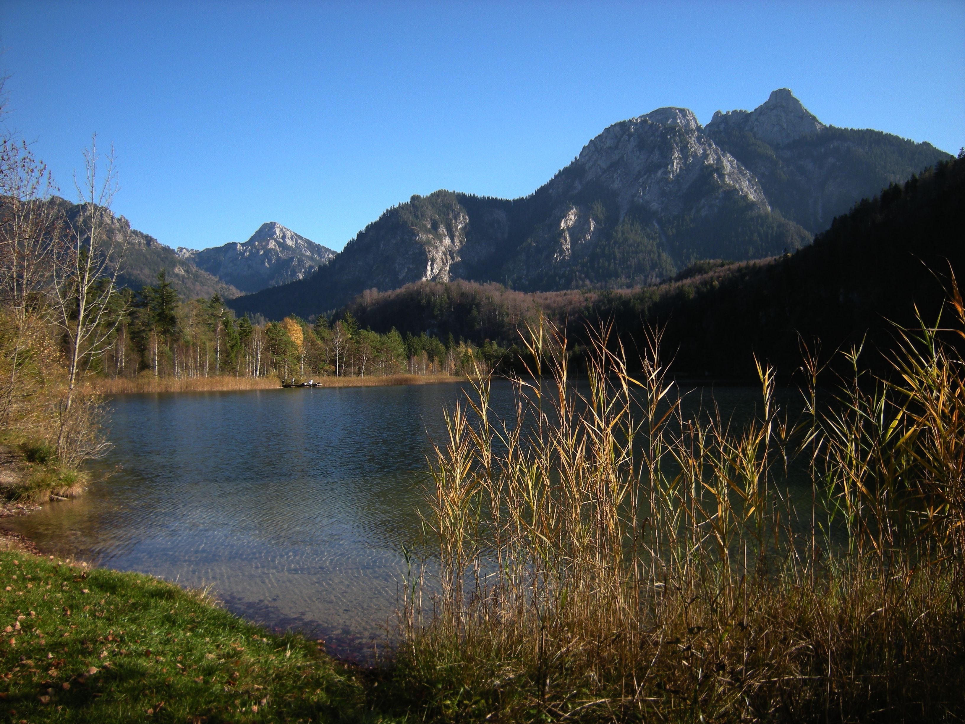 Füssen - Schwansee bei Hohenschwangau.jpg